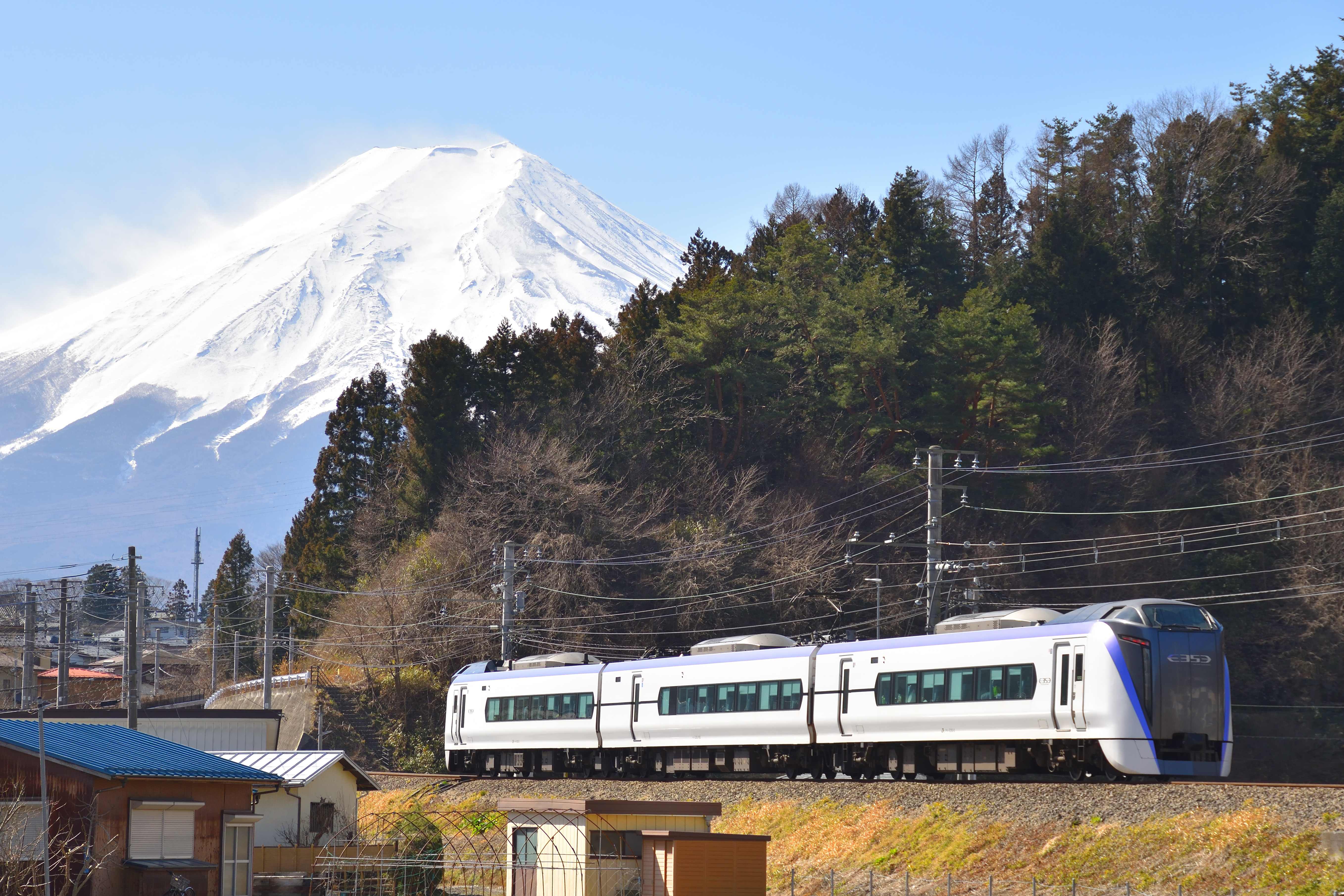 富士急行線 三つ峠～寿